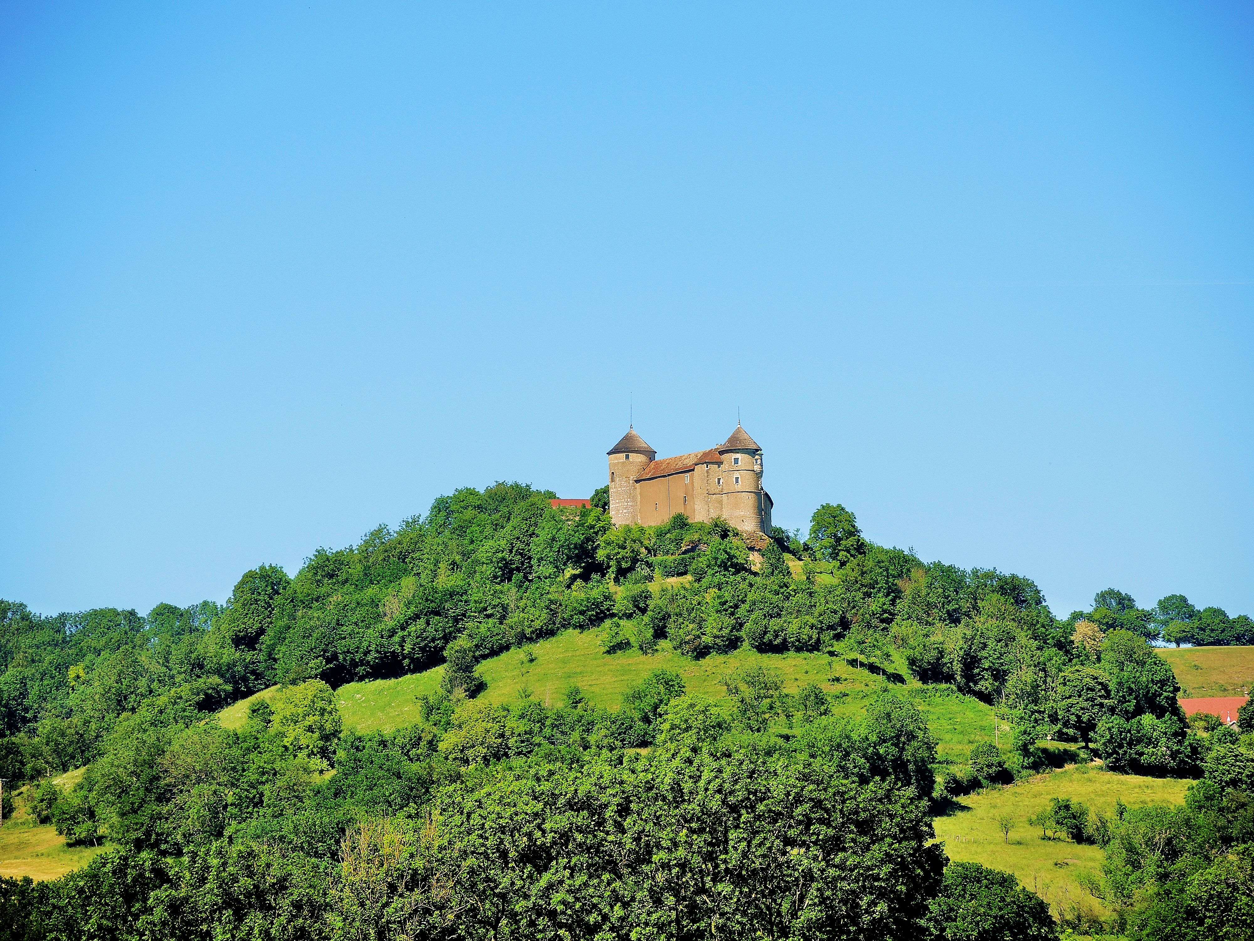 Château de Belvoir, vu de Sancey-l'Eglise.